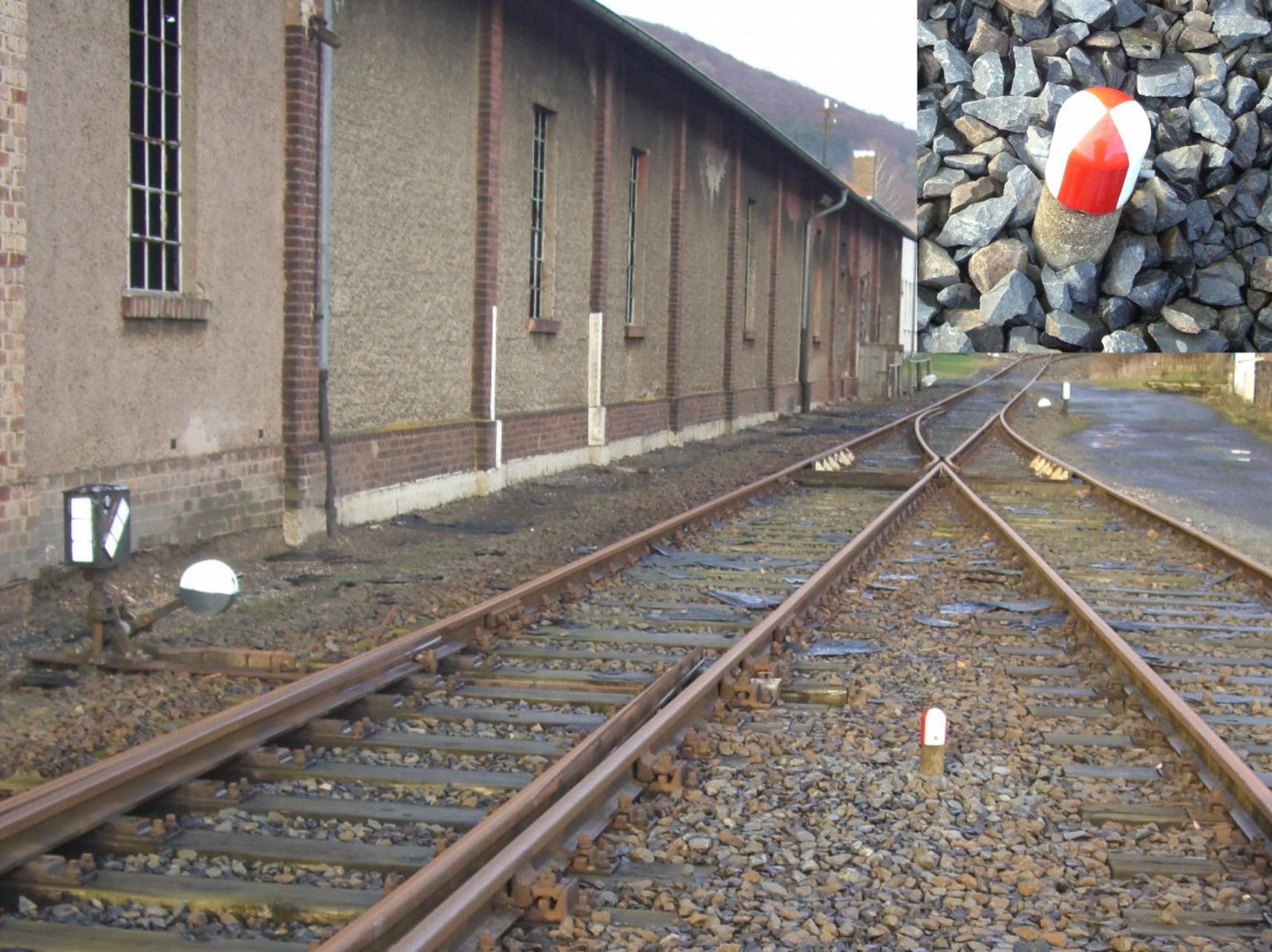 Weichengrenzzeichen (Standort: Schenklengsfeld)